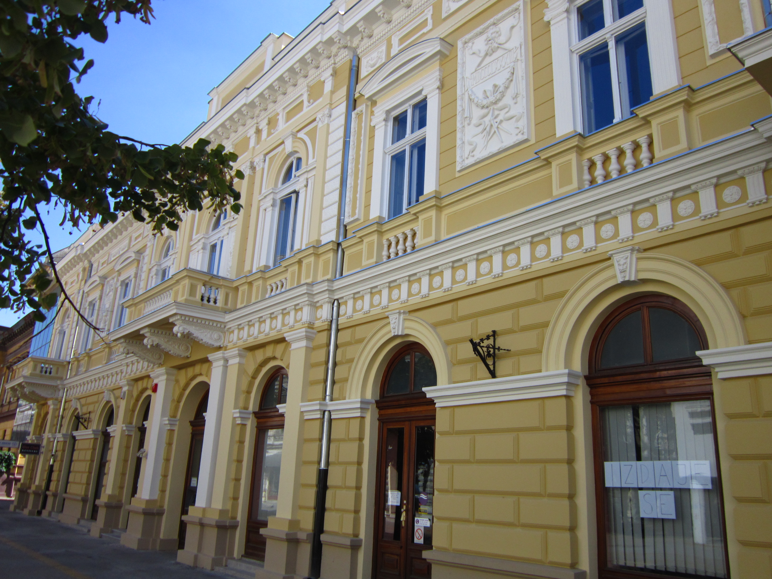 Зграда у Ул. Корзо бр. 10 , Суботица